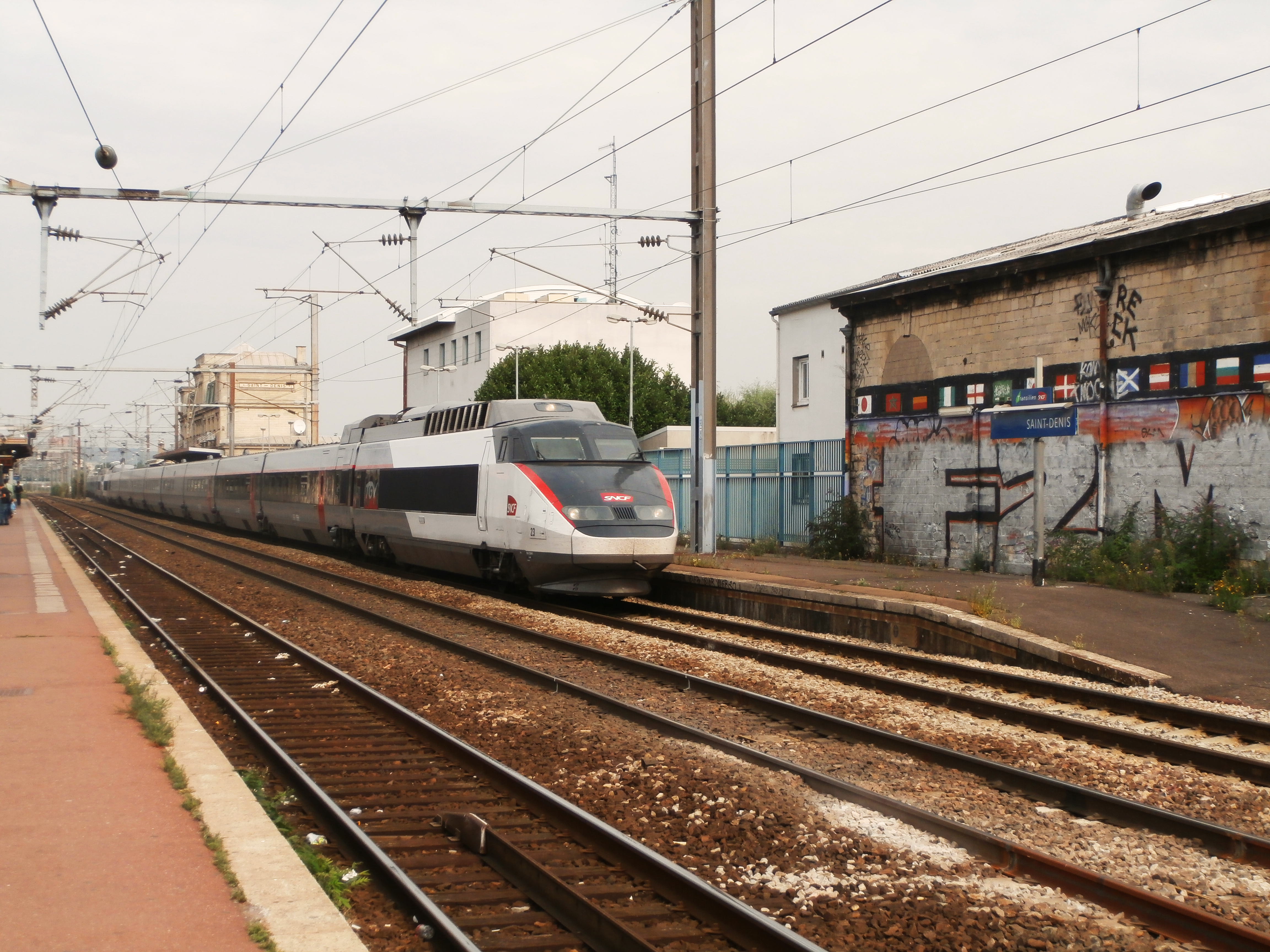 La rame de TGV Sud-Est n°23 en livrée Carmillon au passage de la gare de St-Denis